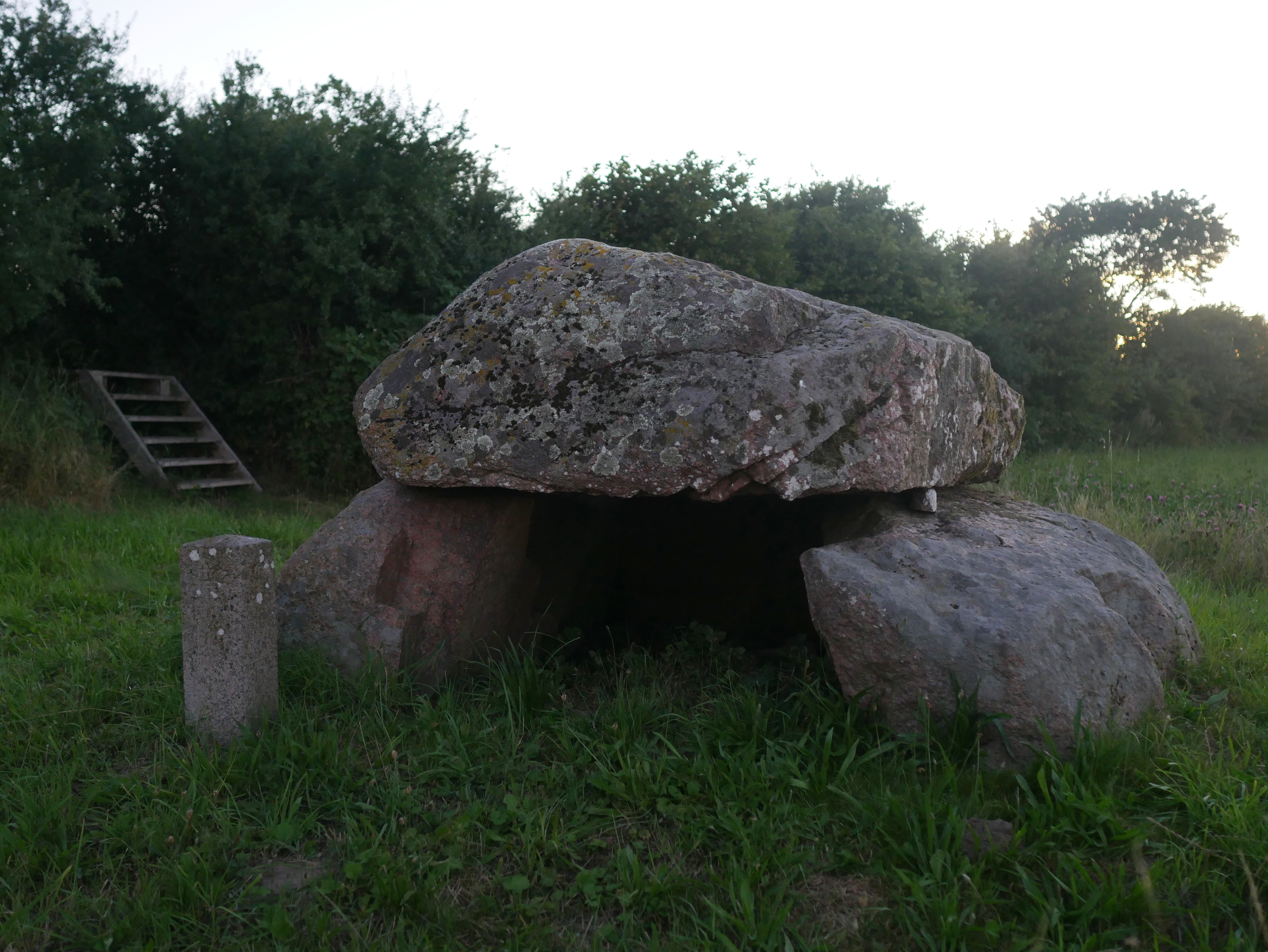 Megalithgrab von Stensby von ONO